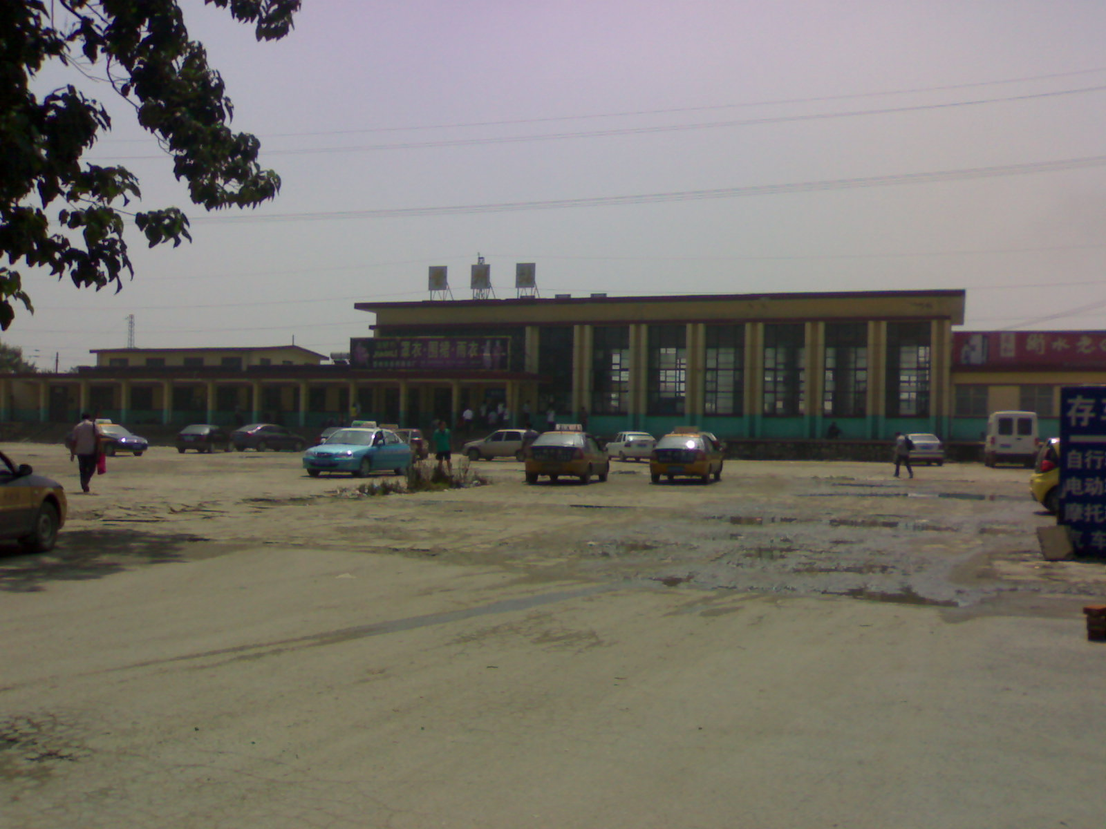 晋州站站房，北侧